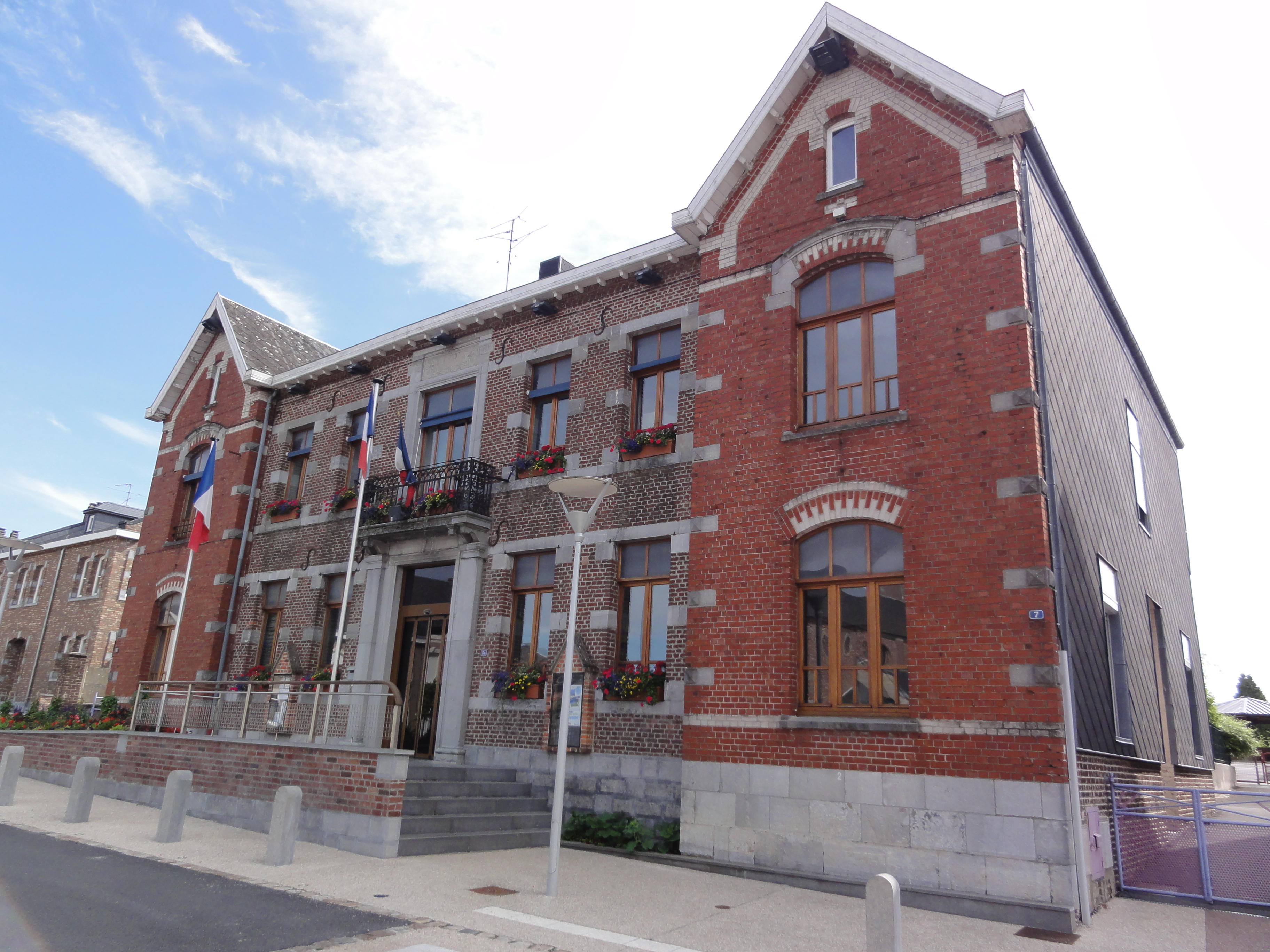 Anor (Nord, Fr) mairie